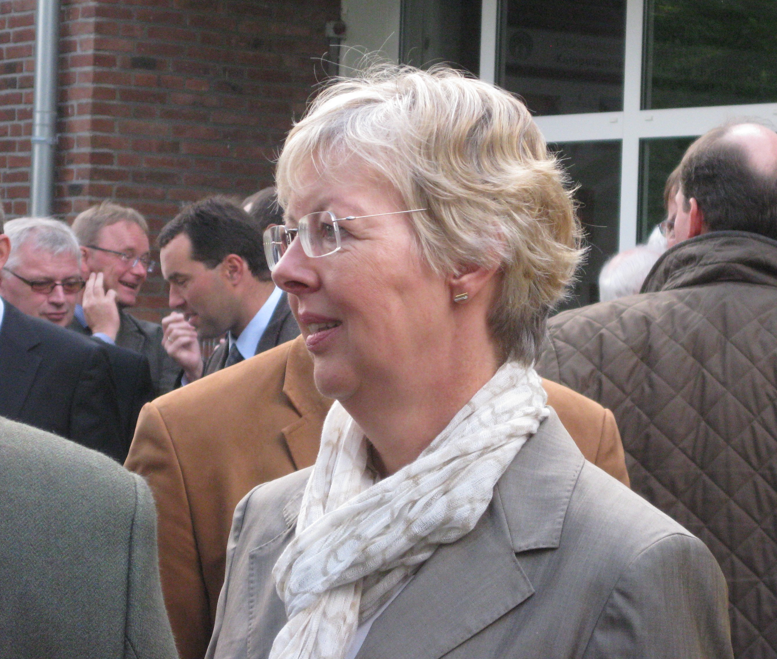 Juliane Rumpf, Landesbauerntag in Rendsburg 2010